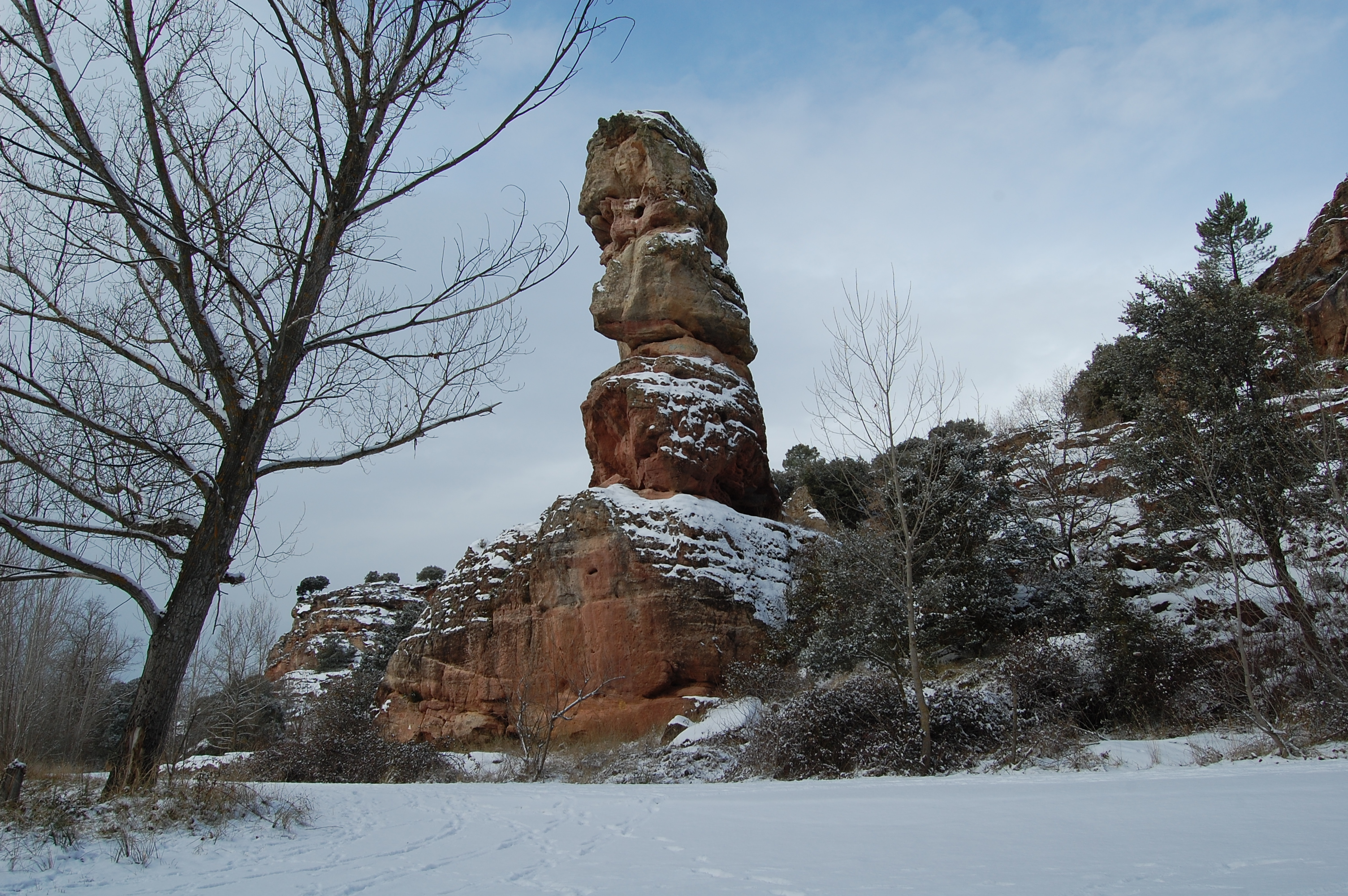 Piedra del Huso, Sigüenza, Guadalajara, Spain